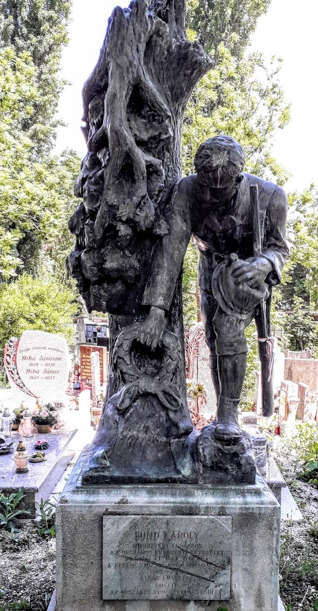 Bund Károly (erdőmérnök, miniszteri tanácsos, főerdőtanácsos; az Országos Erdészeti Egyesület alapító titkára, az Erdészeti Lapok szerkesztője) 1869-1931 síremléke (Felállítás 1933. május 16., Ősi Blazsek László) A síremlék egy derékba tört fatörzset ábrázol, oldalán Dr. Hoffmann Gyula kollégája megható és találó sírversével. [43-1-80] Forrrás:[1]